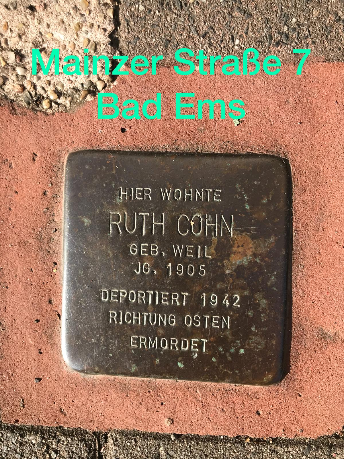 Stolperstein in Bad Ems Mainzer Straße 7